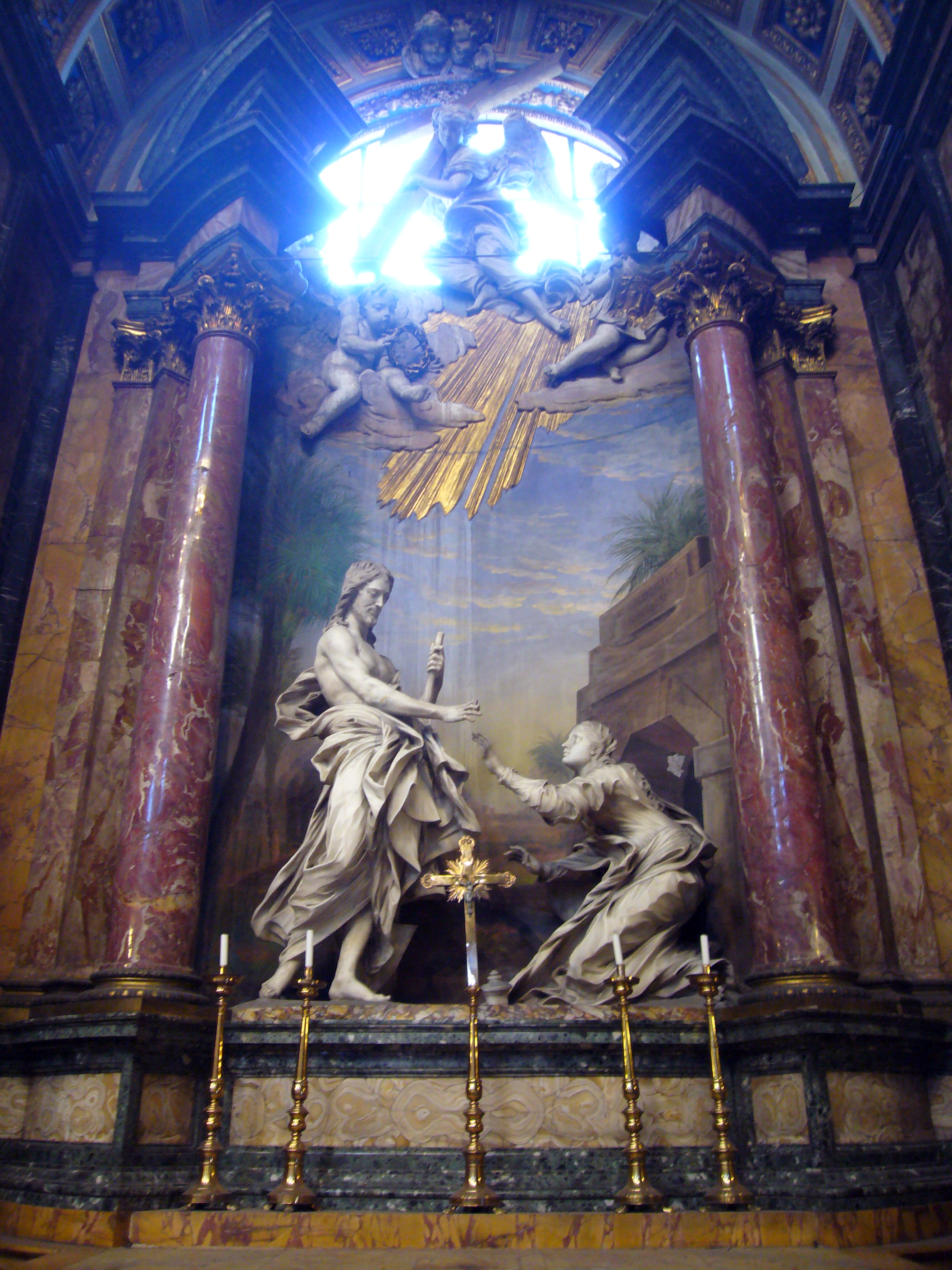 Roma, chiesa dei santi Domenico e Sisto (Angelicum) - Noli me tangere (Antonio Raggi su disegno di Gian Lorenzo Bernini